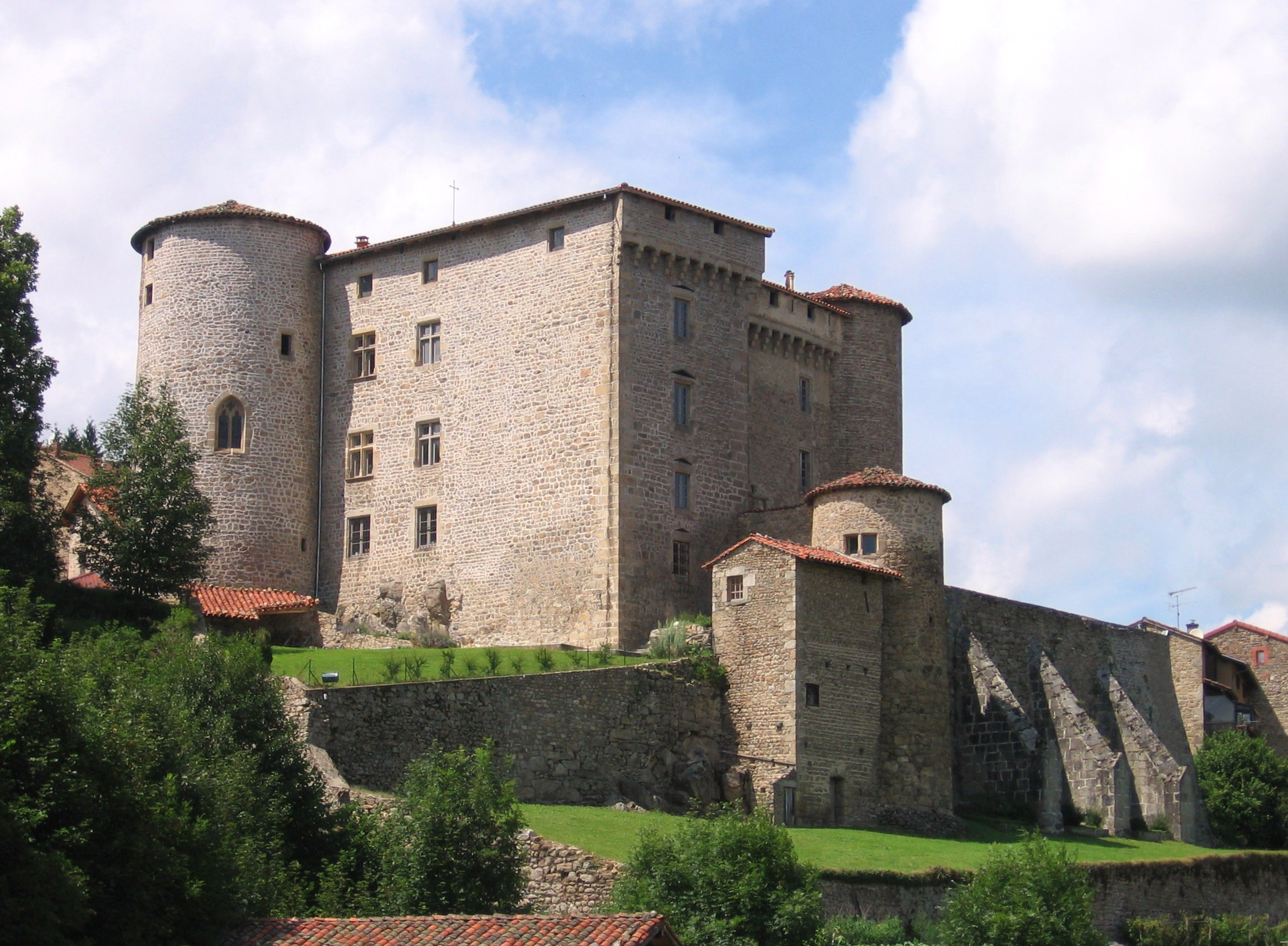 Vue du château